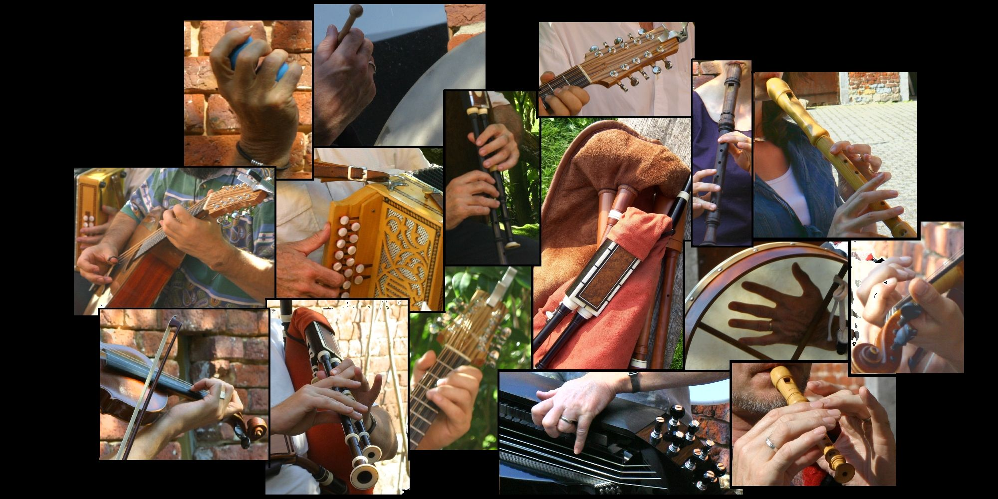 Illu de la page d'accueil du site de Folknam Musique Trad.be